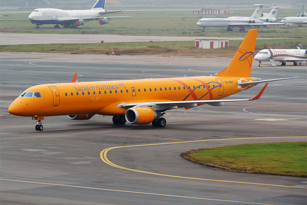 Saratov Airlines, VQ-BRX, Embraer ERJ-195AR